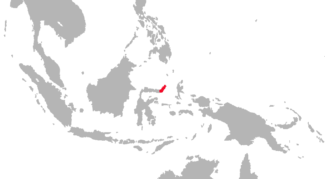 Carte de répartition du macaque à crête. Etablie par Christophe Chauvin.